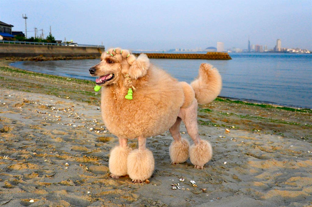 Большой пудель абрикосового окраса